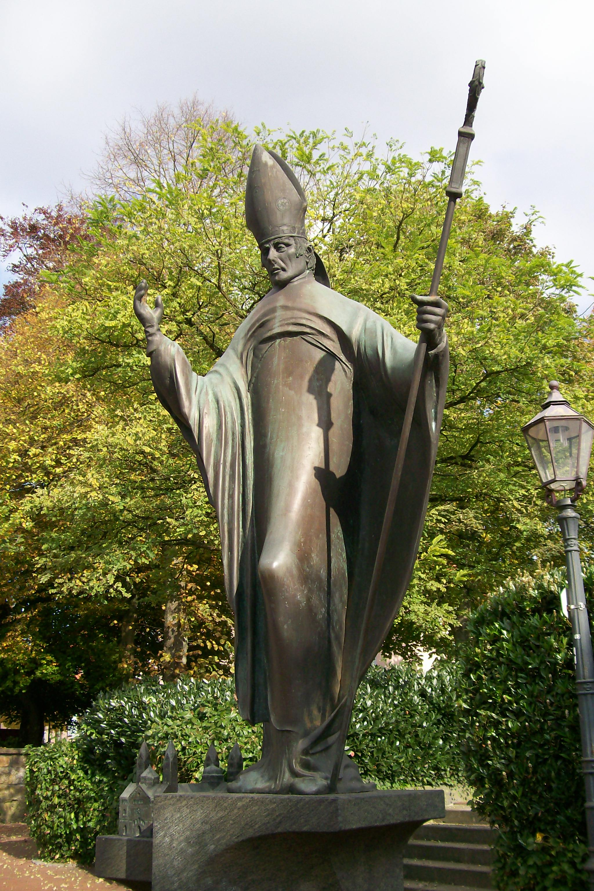 Bischof Benno II. von Osnabrück, Plastik von Hans Gerd Ruwe, Bildhauer aus Osnabrück, von 1987 in Bad Iburg, Niedersachsen